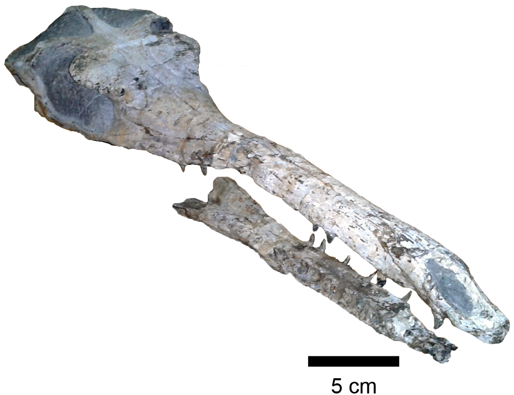 Maledictosuchus riclaensis, holotype MPZ 2001/130a (MPZ, Museo Paleontológico de la Universidad de Zaragoza).